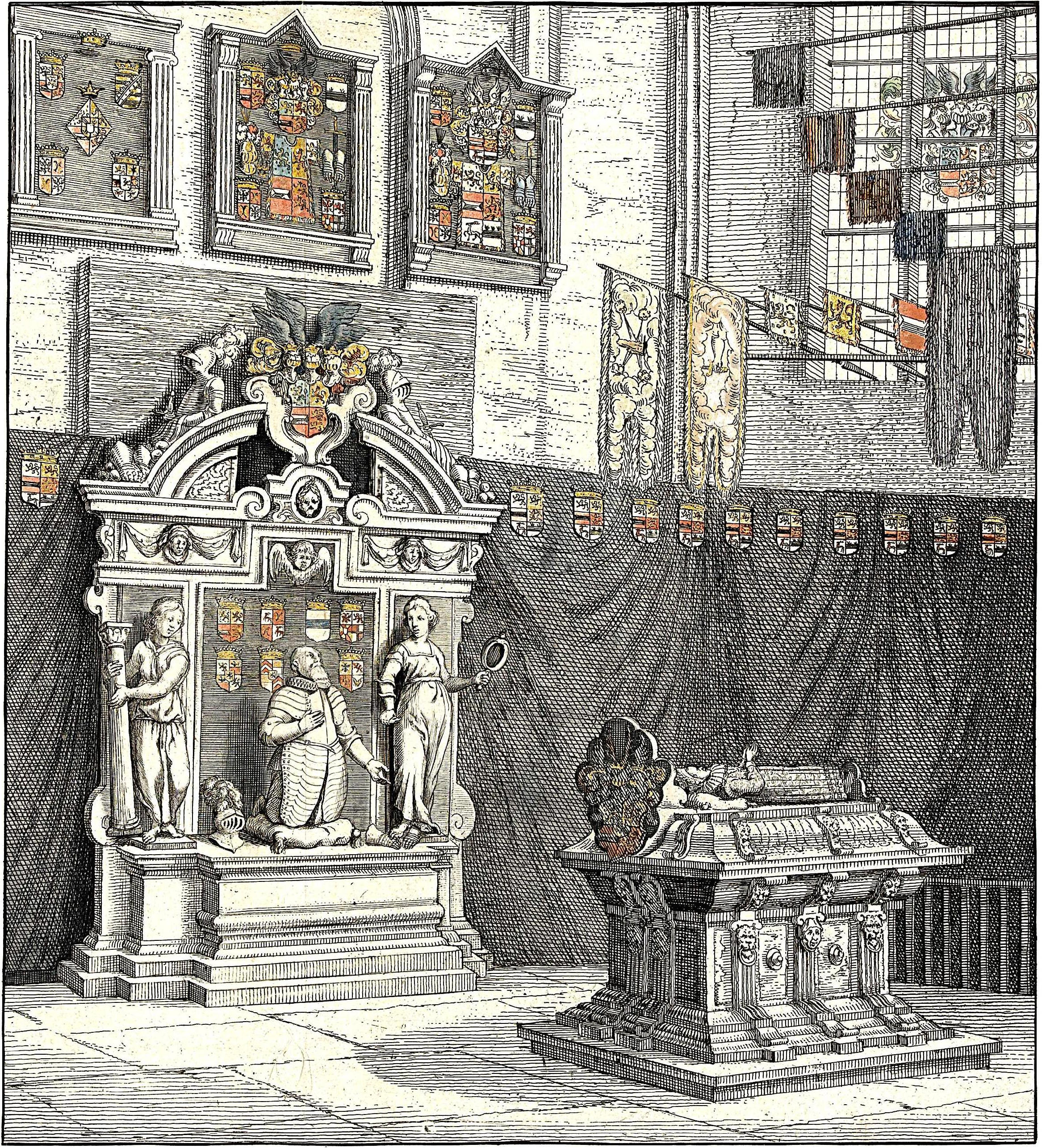 Detail van een prent waarop een portret van Ernst Casimir, zijn sneuvelen bij Roermond en het interieur van de Grote Kerk te Leeuwarden (plaat 1) in de prentserie van de begrafenis van Ernst Casimir, graaf van Nassau-Dietz te Leeuwarden, 3 januari 1633.